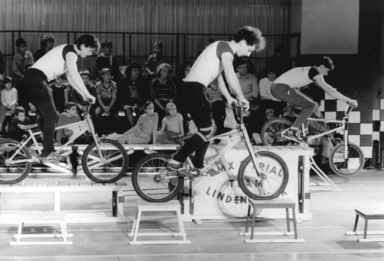 ADN-ZB Link 9.10.88 Berlin: Buntes Programm- Zum "Tag der Familie" hatte der Palast der Republik am 8.9.10. Eltern und Kinder eingeladen. Sport, Spiel und Spaß erwartete die Besucher jeweils nachmittags in allen Etagen des Hauses. Im Hauptfoyer zeigten Mario Boche, Jens Maier und Michael Röder als Team "BMX und Trial" (MC Zossen) aus Lindenbrück Fahrradtrial-Darbietungen. - siehe auch 9 N-"